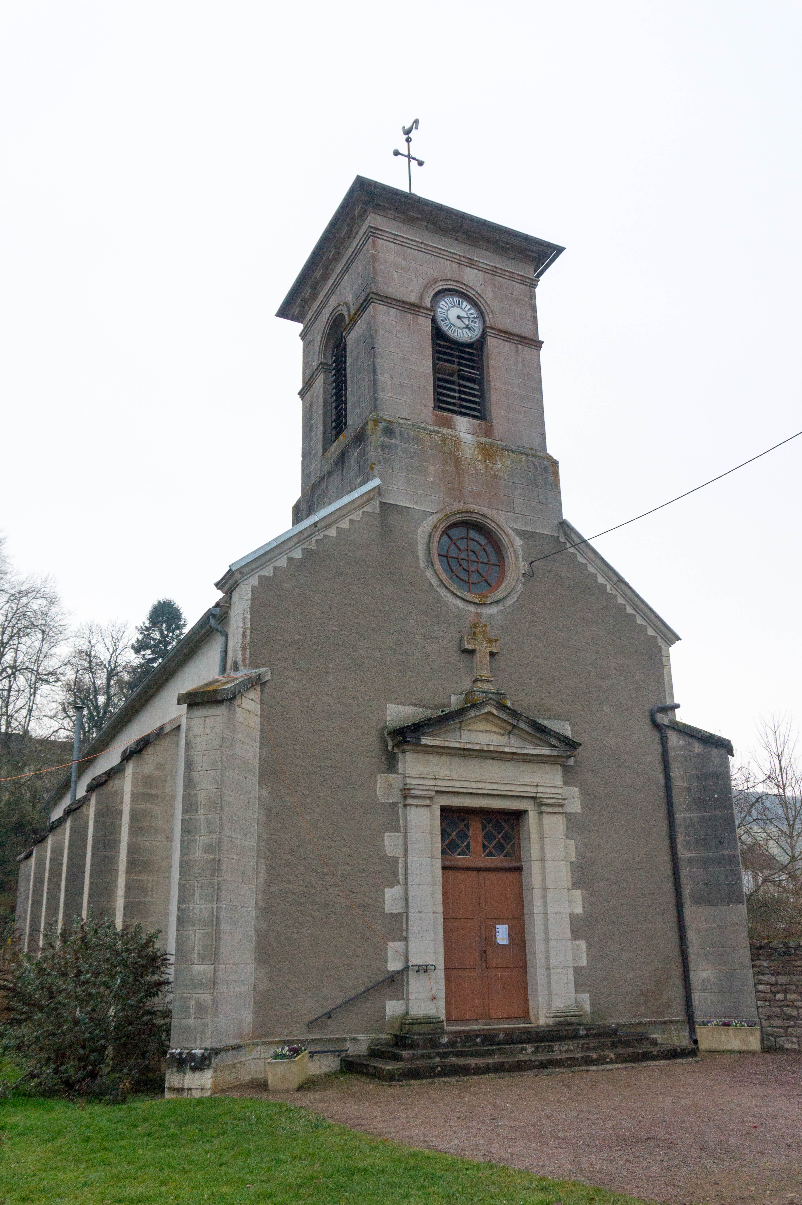 Église Saint Martin (Uncey-le-Franc)